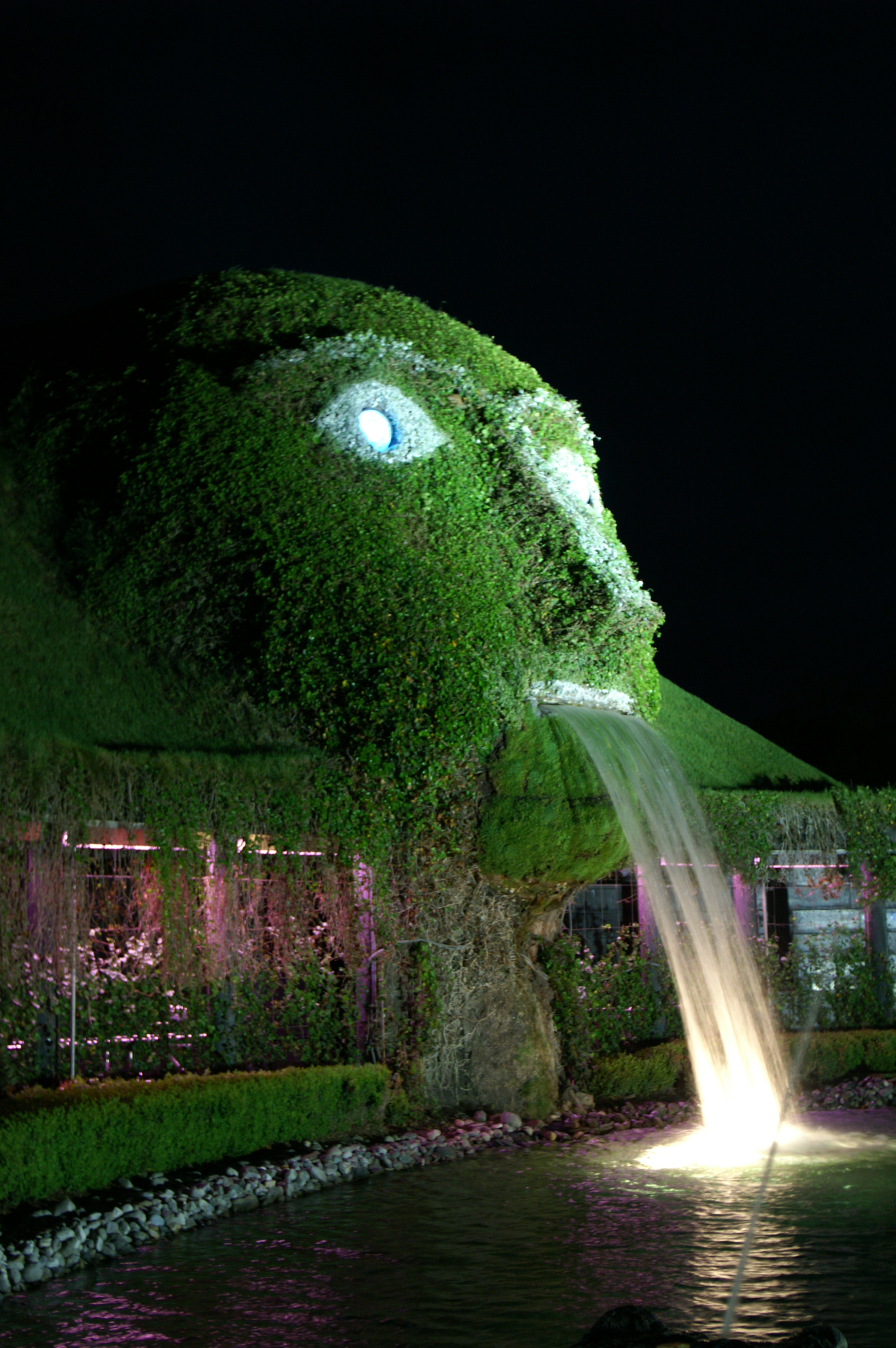 Eingang zu den Kristallwelten (derRiese) in Wattens